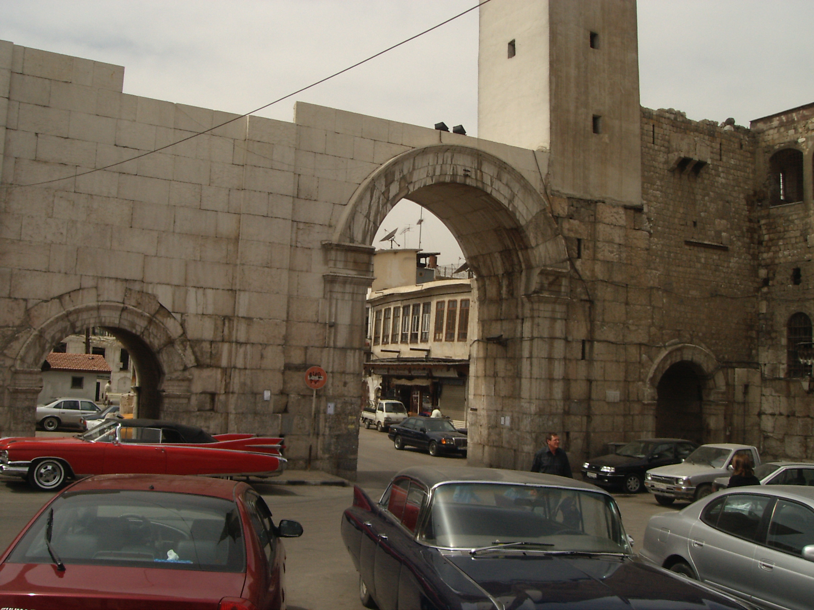 Enceinte de la vieille ville de Damas, à Bab Sharki